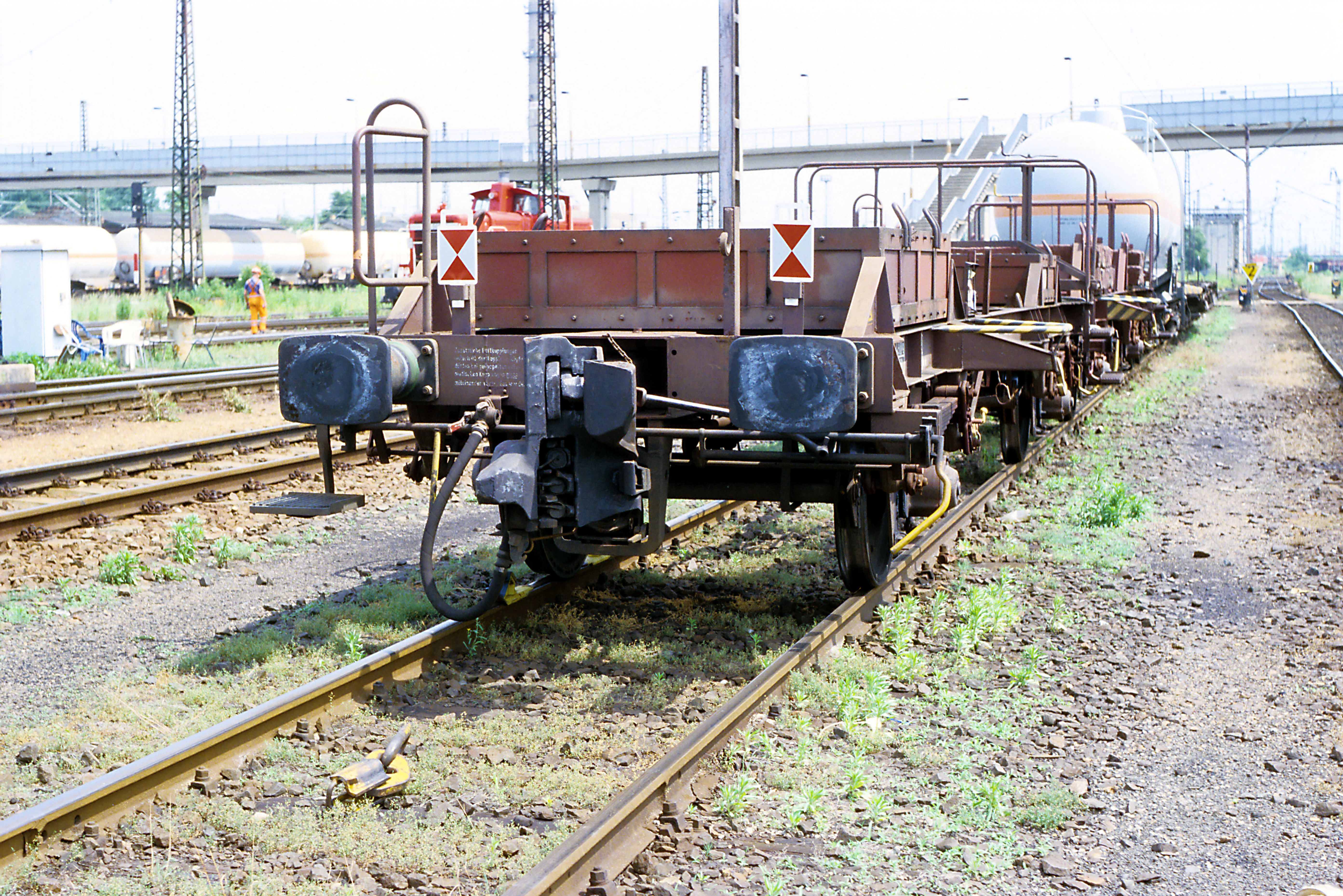 ursprünglich mit SA3-Kupplung für in Mukran umgespurte russische Güterwagen unter Verwendung von serienmäßigen, für Kesselwagen entwickelte Untergestelle, gebaut. Die Seite mit der größeren Ballastmasse trug bei Lieferung die SA3-, die andere die Schraubenkupplung. Für die Überführung von Erzwagen erhielten die Wagen an beiden Enden eine Mittelpufferkupplung Bauart Intermat, Seitenpuffer und je eine lose Gemischtkupplung.Bereit zum Kuppeln, die Gemischtkupplung ist entfernt (sie liegt vor dem Wagen im Gleis). Bei Nichtnutzung wird sie am Haken links neben der rechten Schlussscheibe aufgehängt.